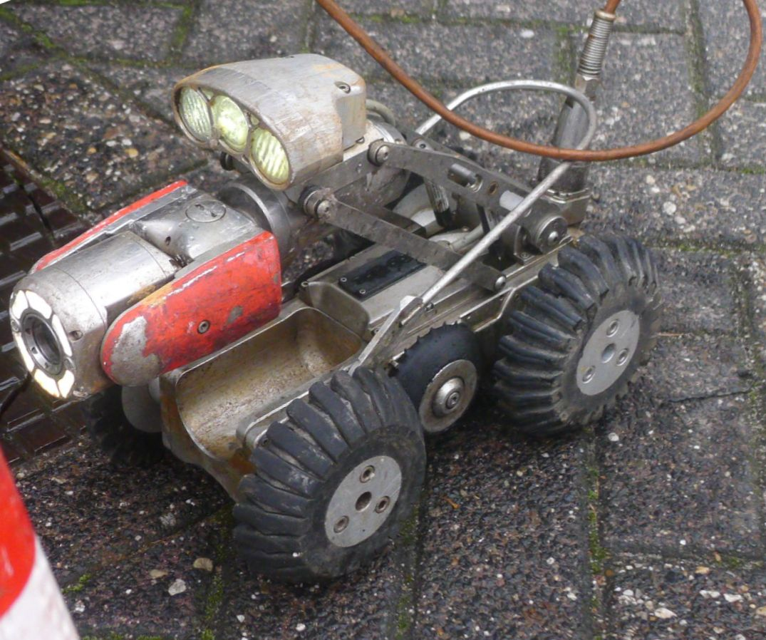 Camerawagentje voor rioolvideoschouw